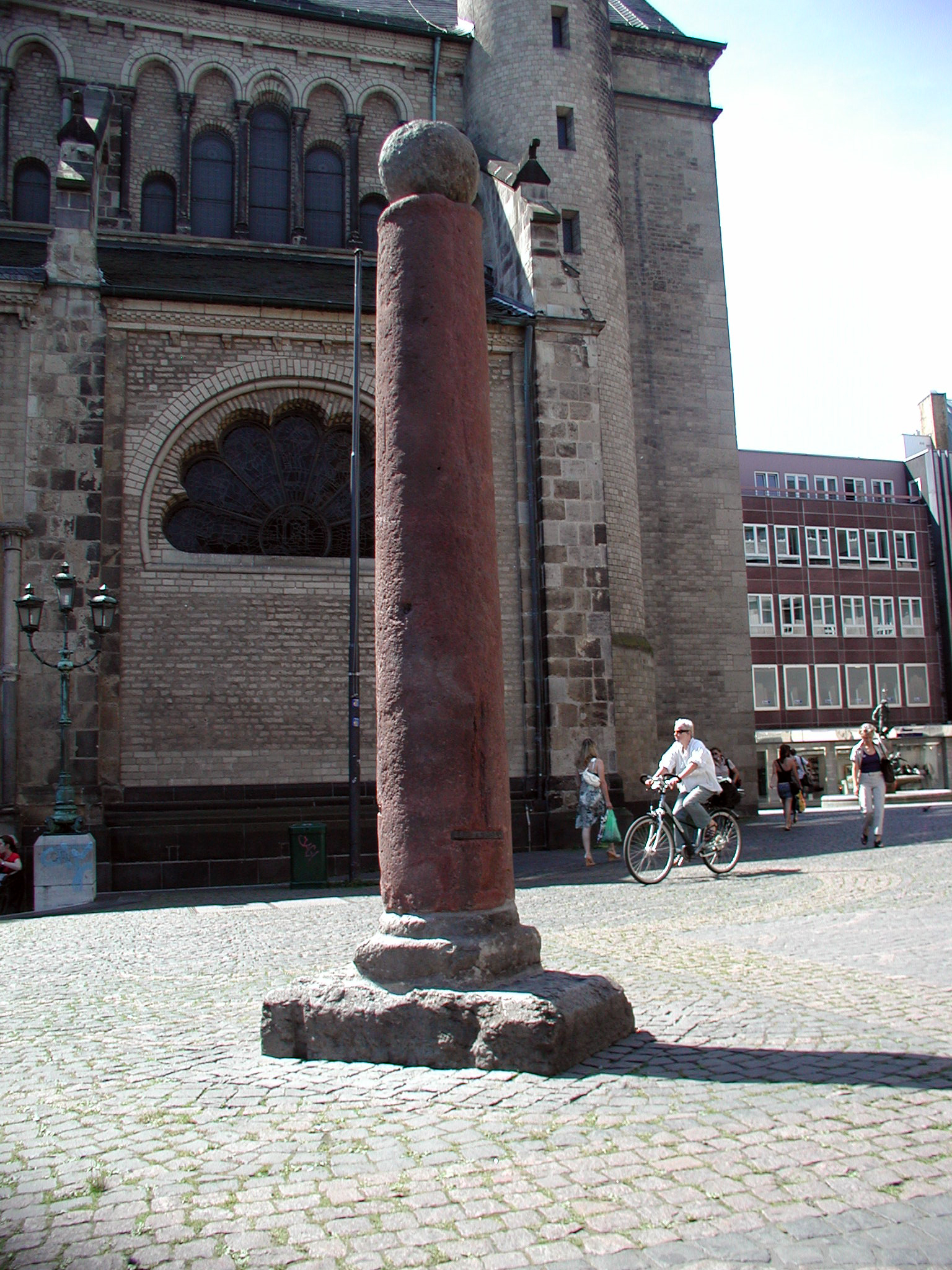 Pranger Bonn, Münsterplatz